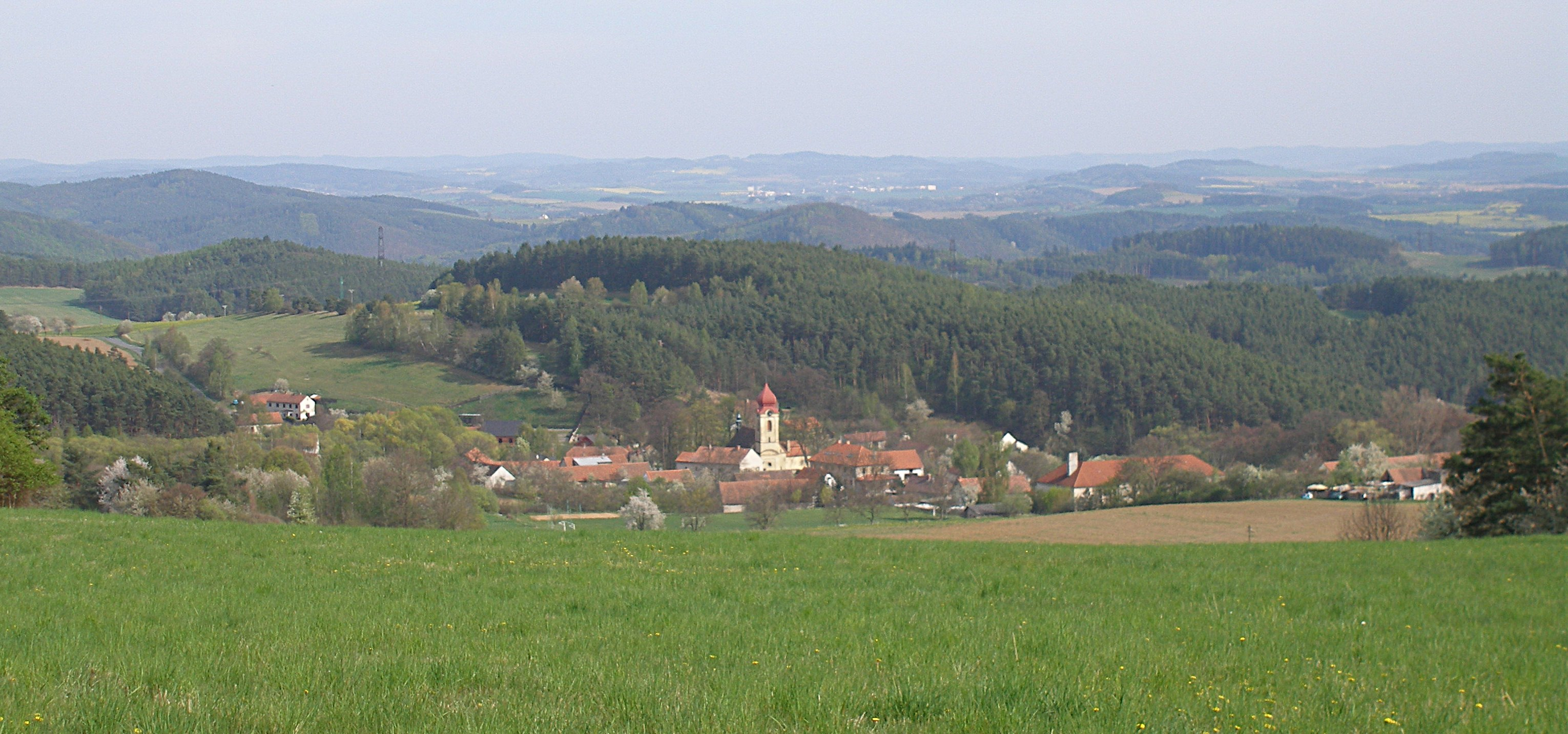 Pohled na Borotice (okres Příbram) od západu. V pozadí (zhruba nad borotickou kostelní věží) se nacházejí Sedlčany.